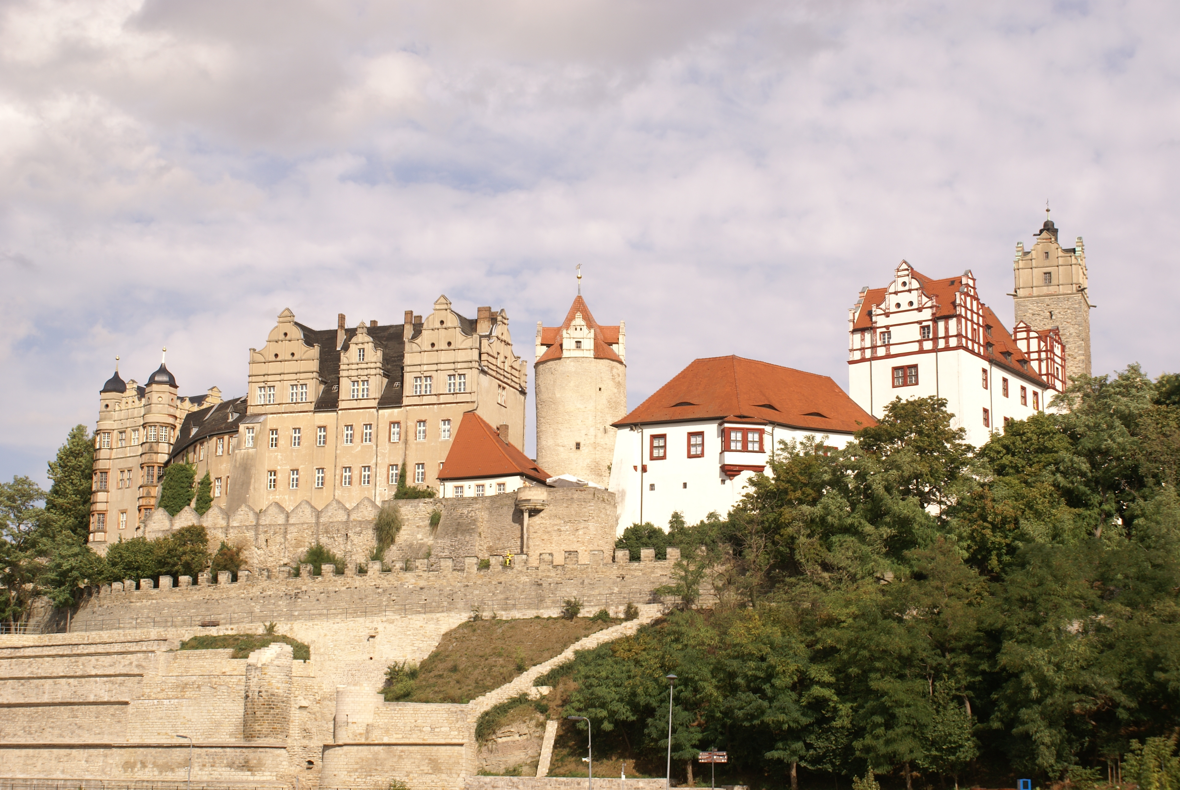 Schloss Bernburg, von der Saale-Fähre aus aufgenommen